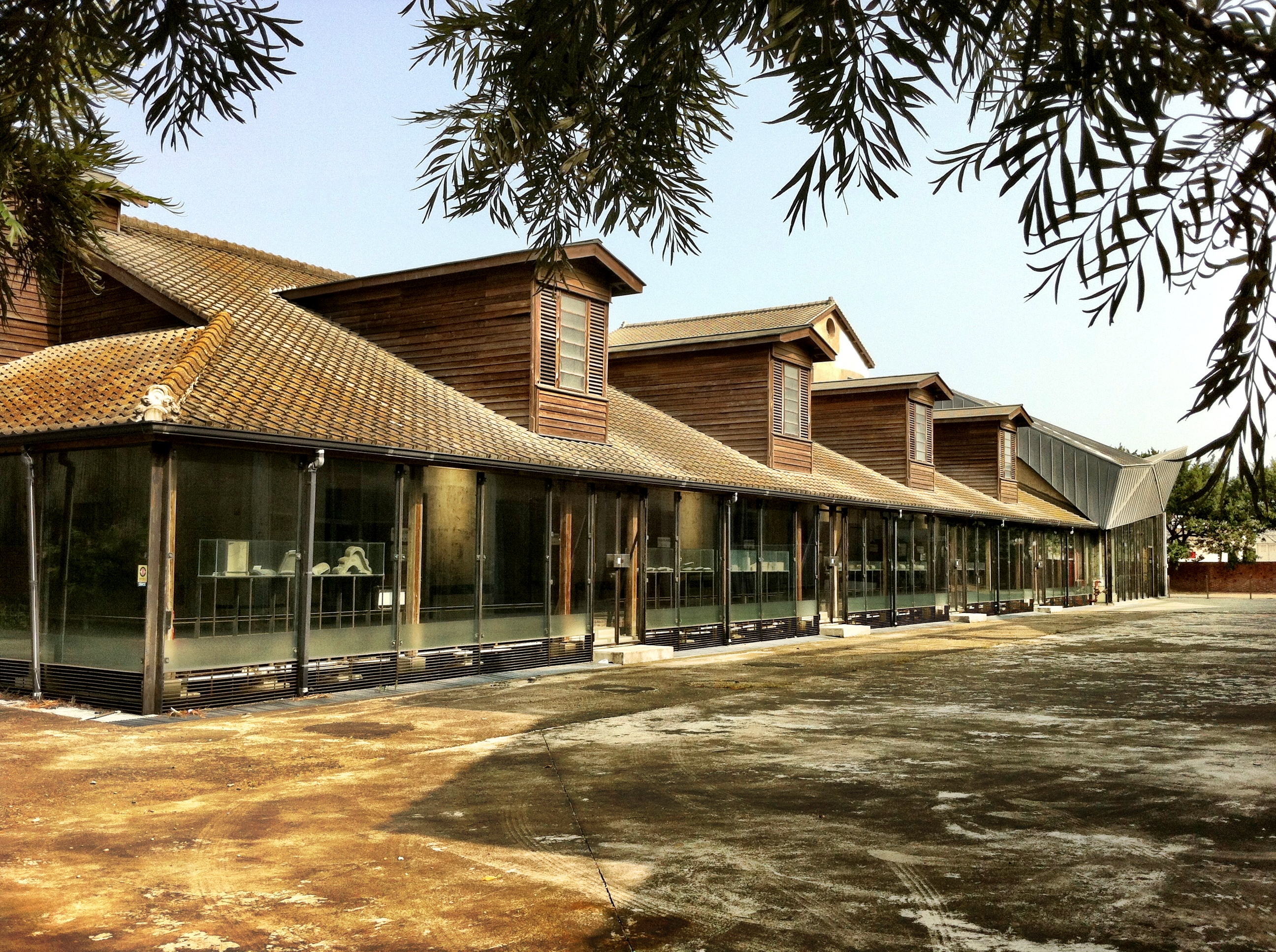 日治時期的稻米穀倉